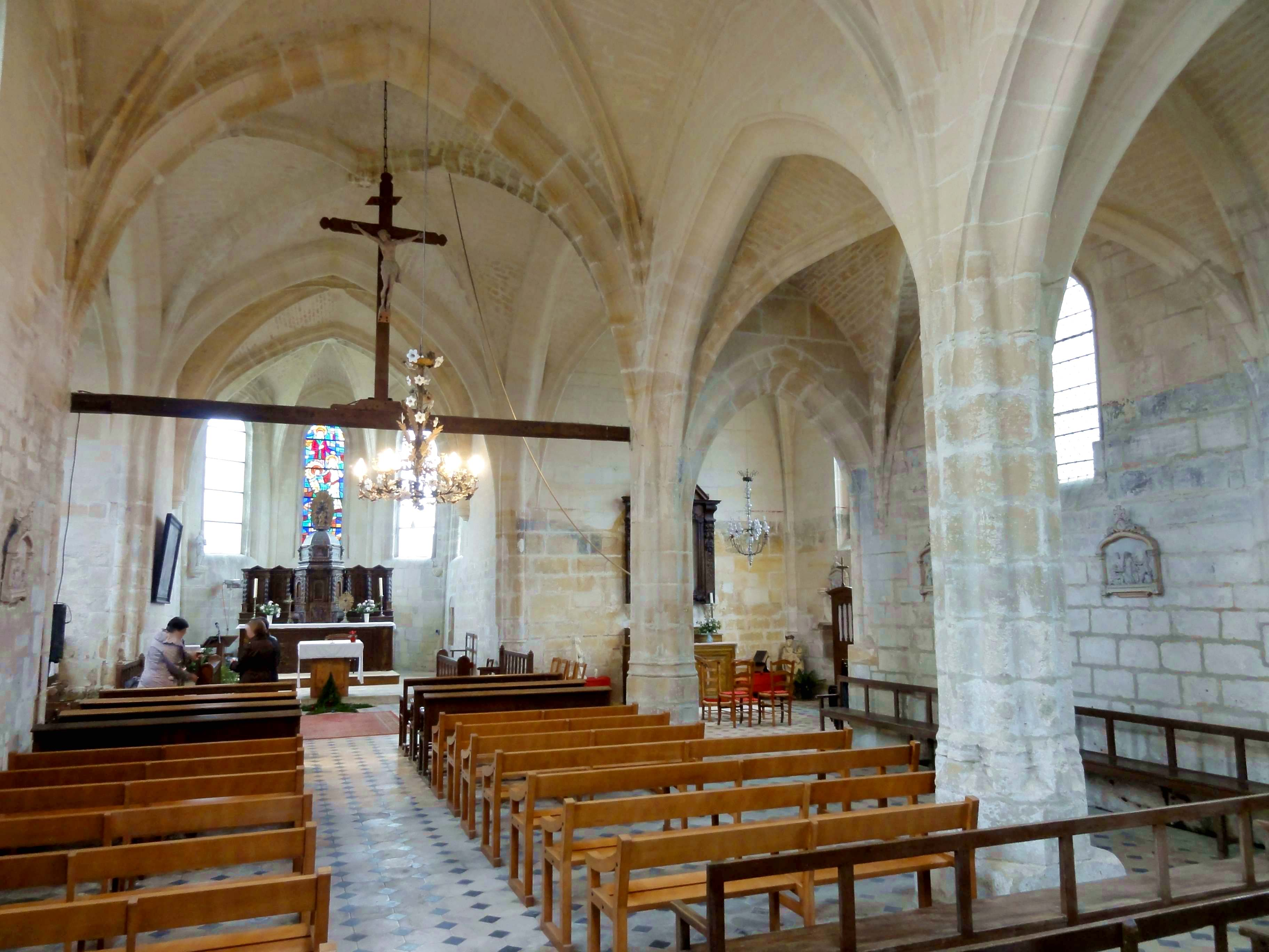 Nef, vue vers l'est.